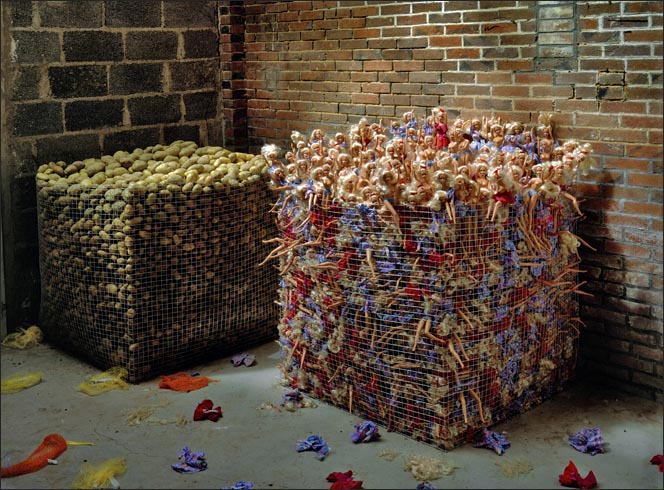 Gerhard_vormwald-one_cubic_meter_potatoes,_one_cubic_meter_barbie_-le_couéche-1993